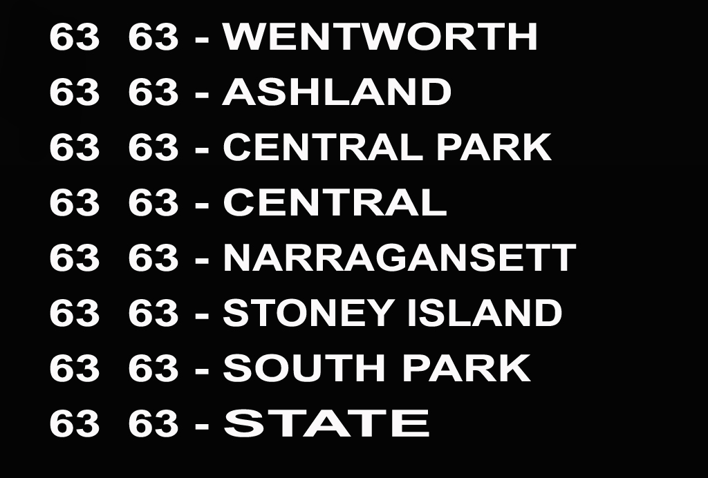 Zelfgemaakte media in Photoshop CS